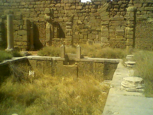 Territoires et monuments de l'antique Thamugadi.